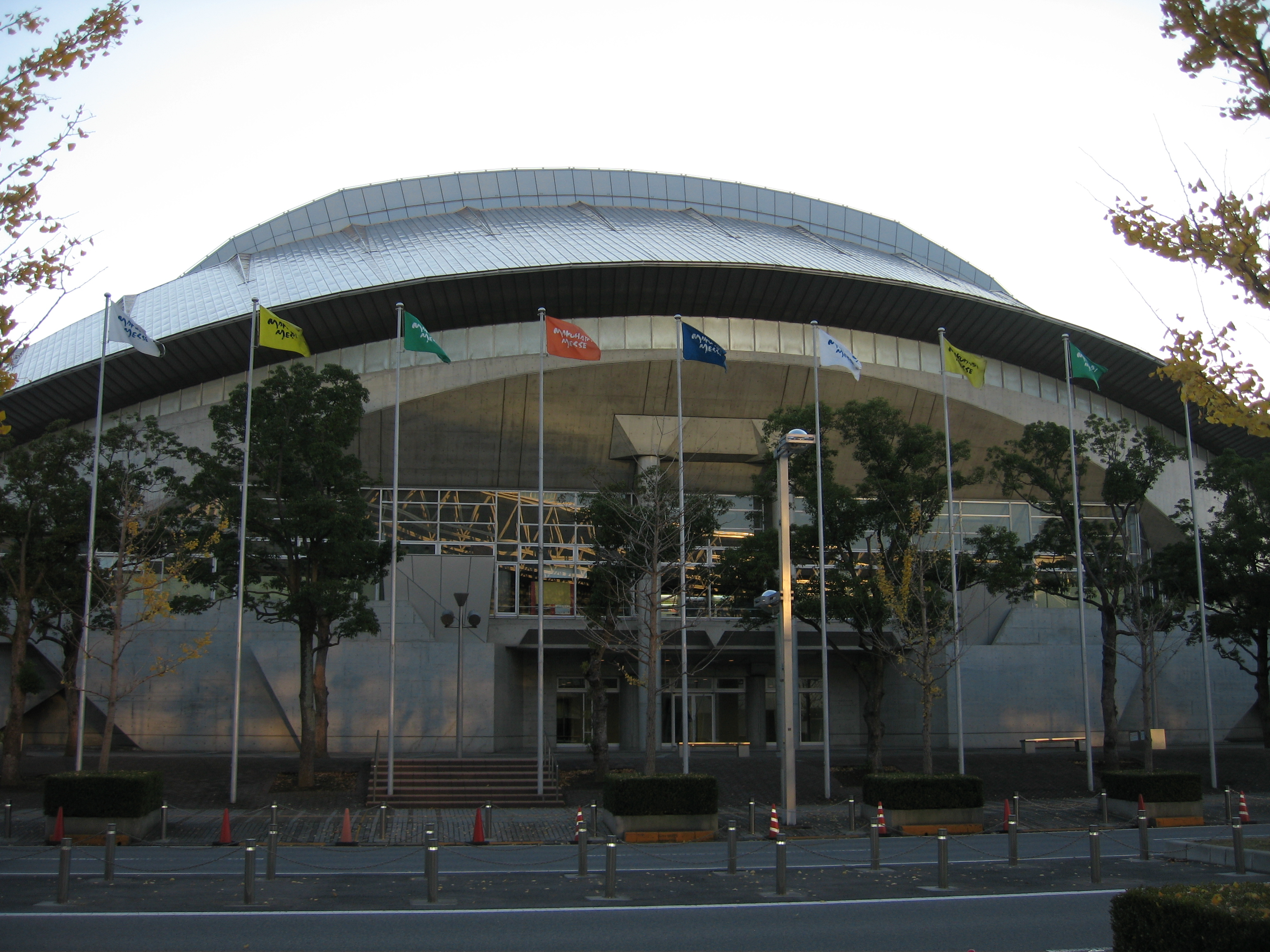 Makuhari Messe in Chiba, Japan